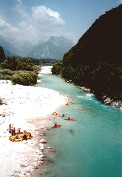 Rafting am Oberlauf der Soca bei Bovec